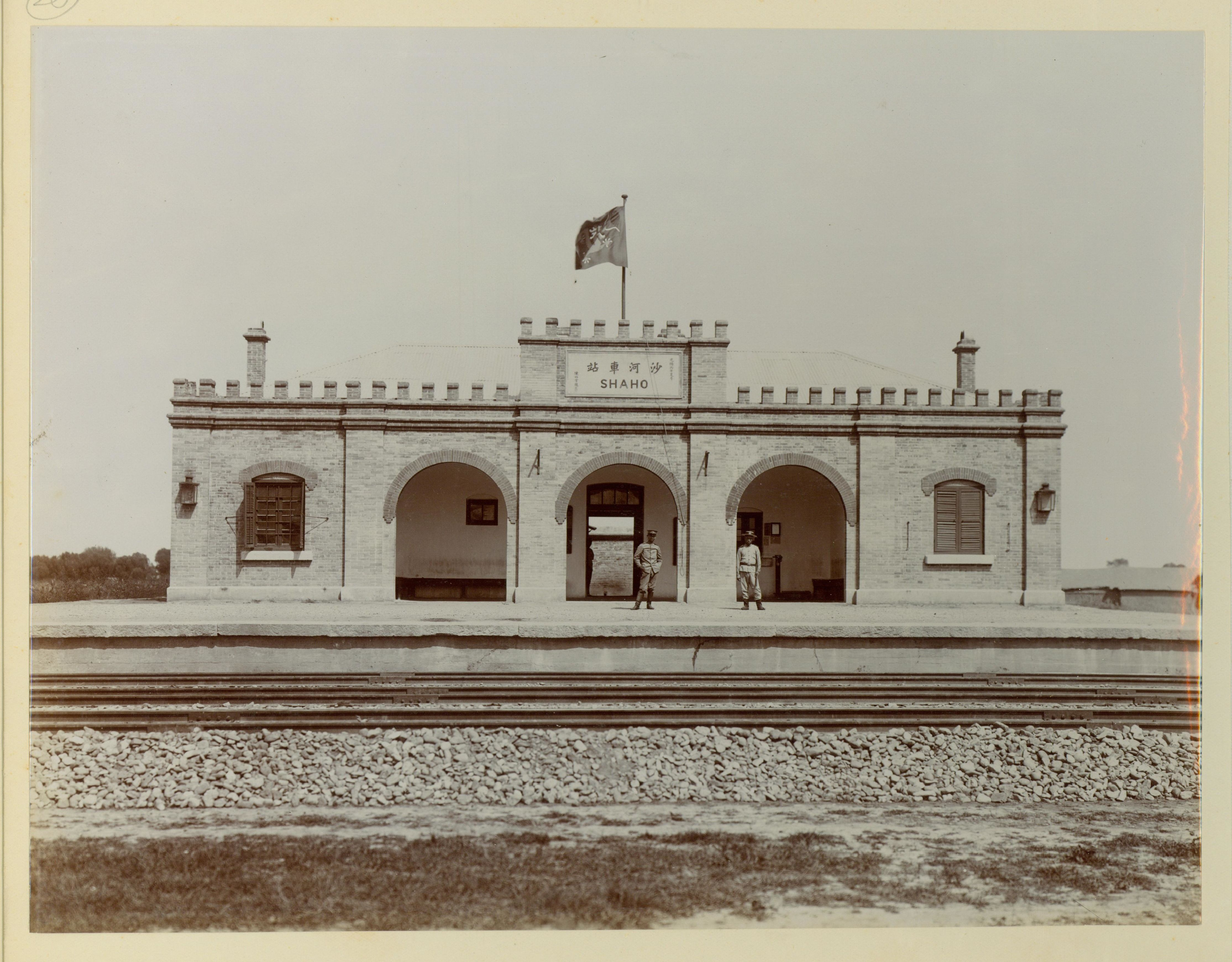 该图没有标题，它显示了位于京张铁路上的沙河车站。车站正立面书有中文和音译的站名，两侧以较小的中文书写着：“光绪丙午夏季”（1906 年）和“陈昭常题”。